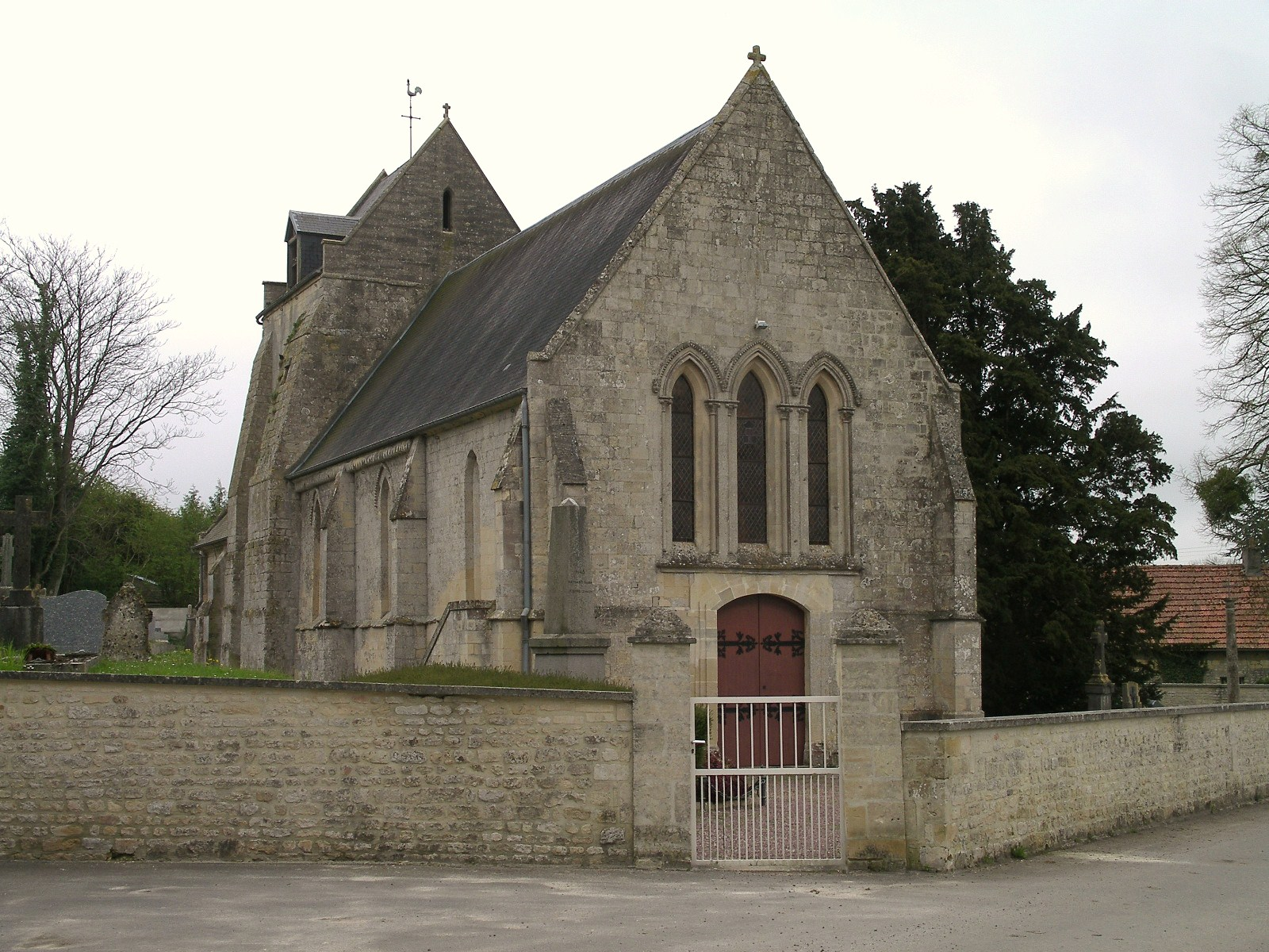 Église Notre-Dame-de-l'Assomption (XIIIe siècle) à Brouay (Calvados)